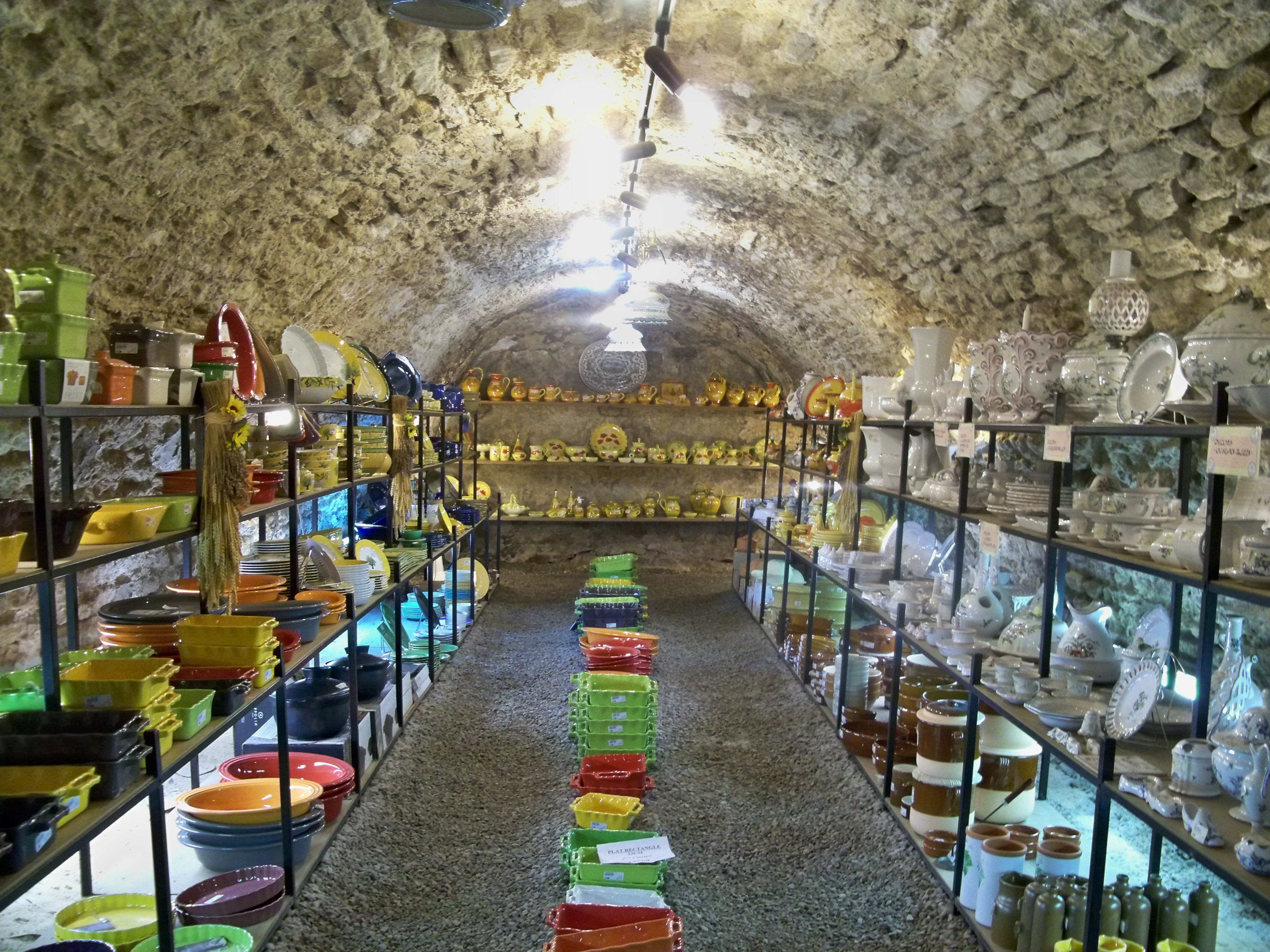 Cave romaine à Apt (84) France